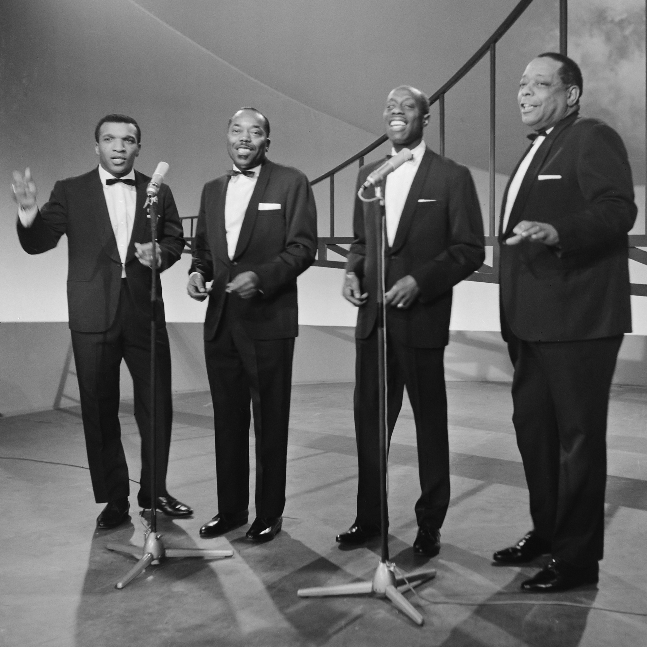 Johnny en Rijk een paar apart show, "The Golden Gate Quartet" 29 december 1964